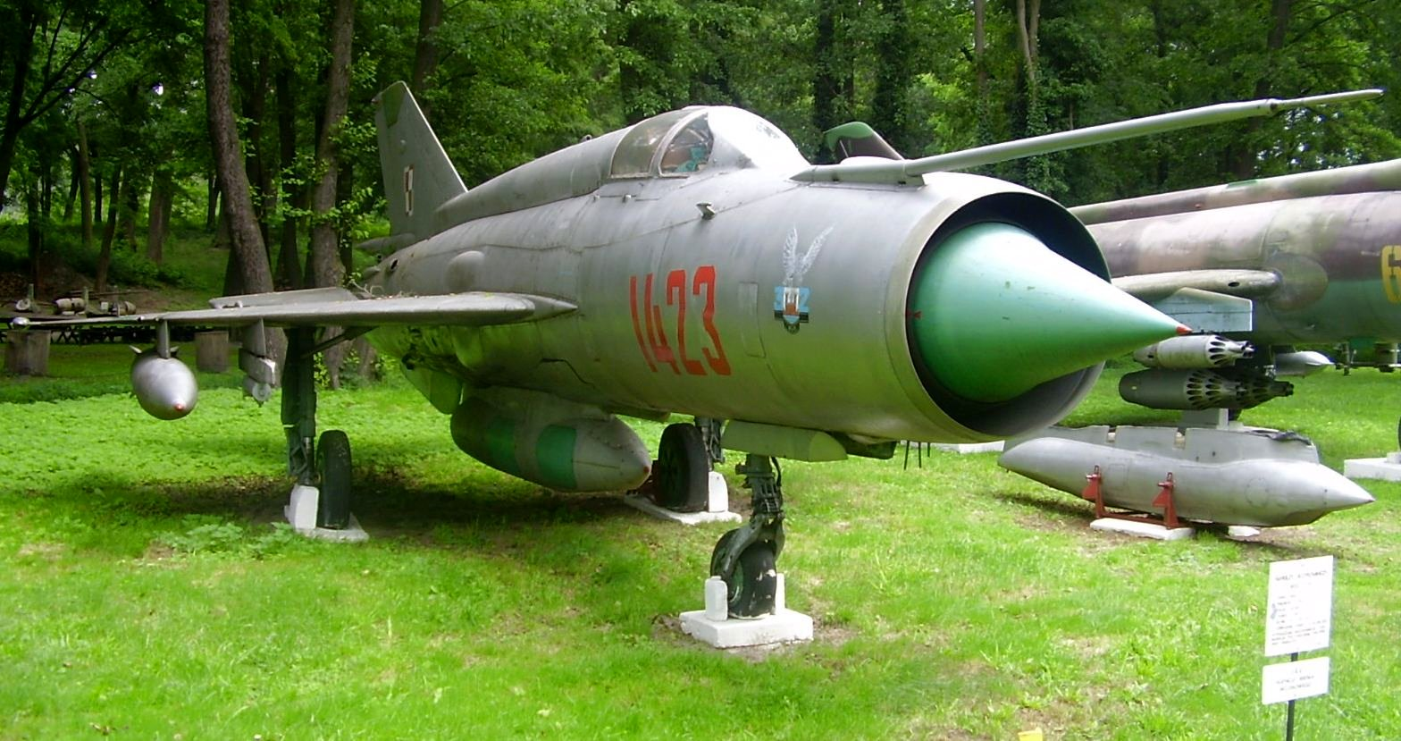 MIG-21R